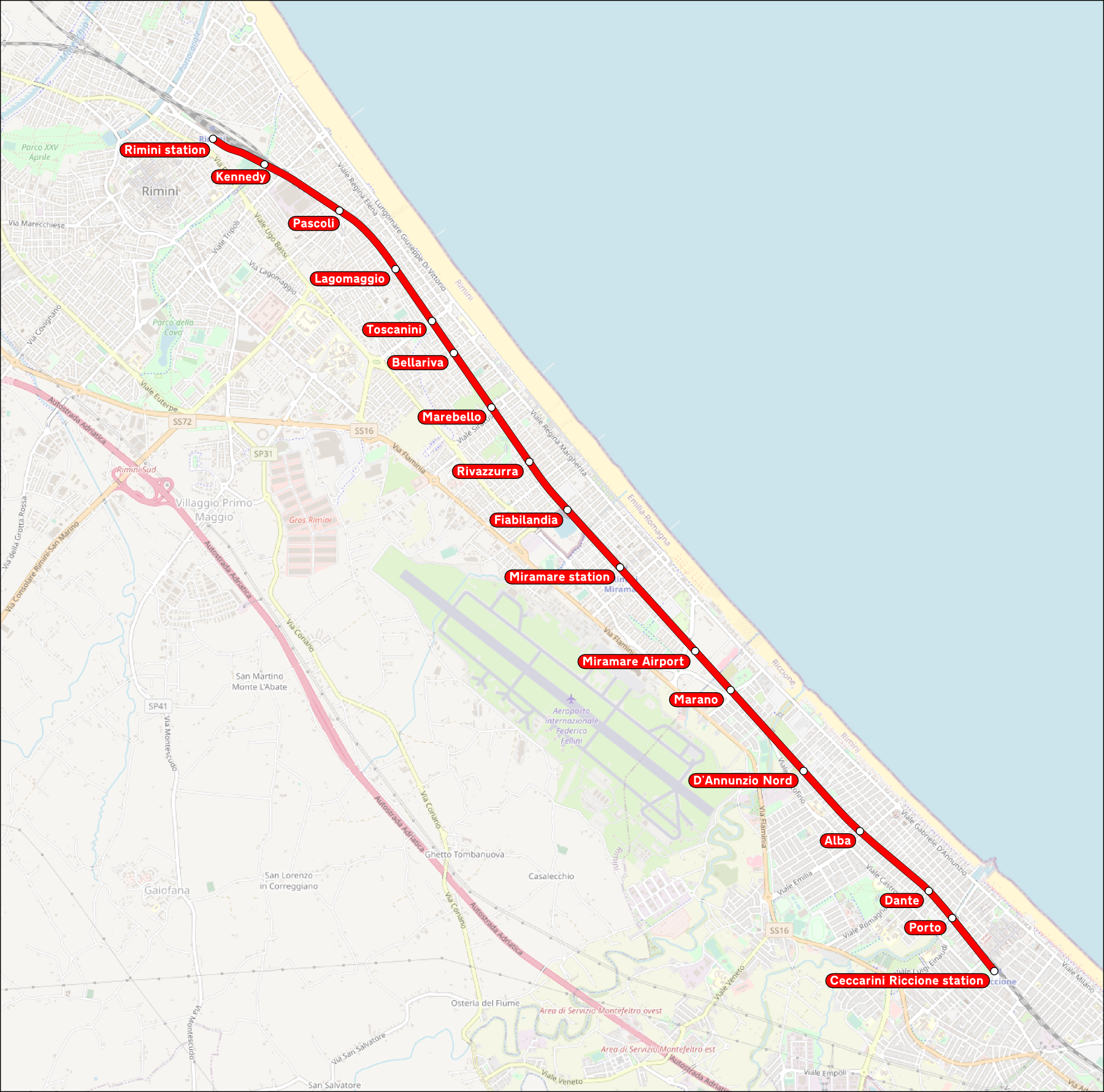 Mappa del Metromare di Rimini. This map may be incomplete, and may contain errors. Don't rely solely on it for navigation.